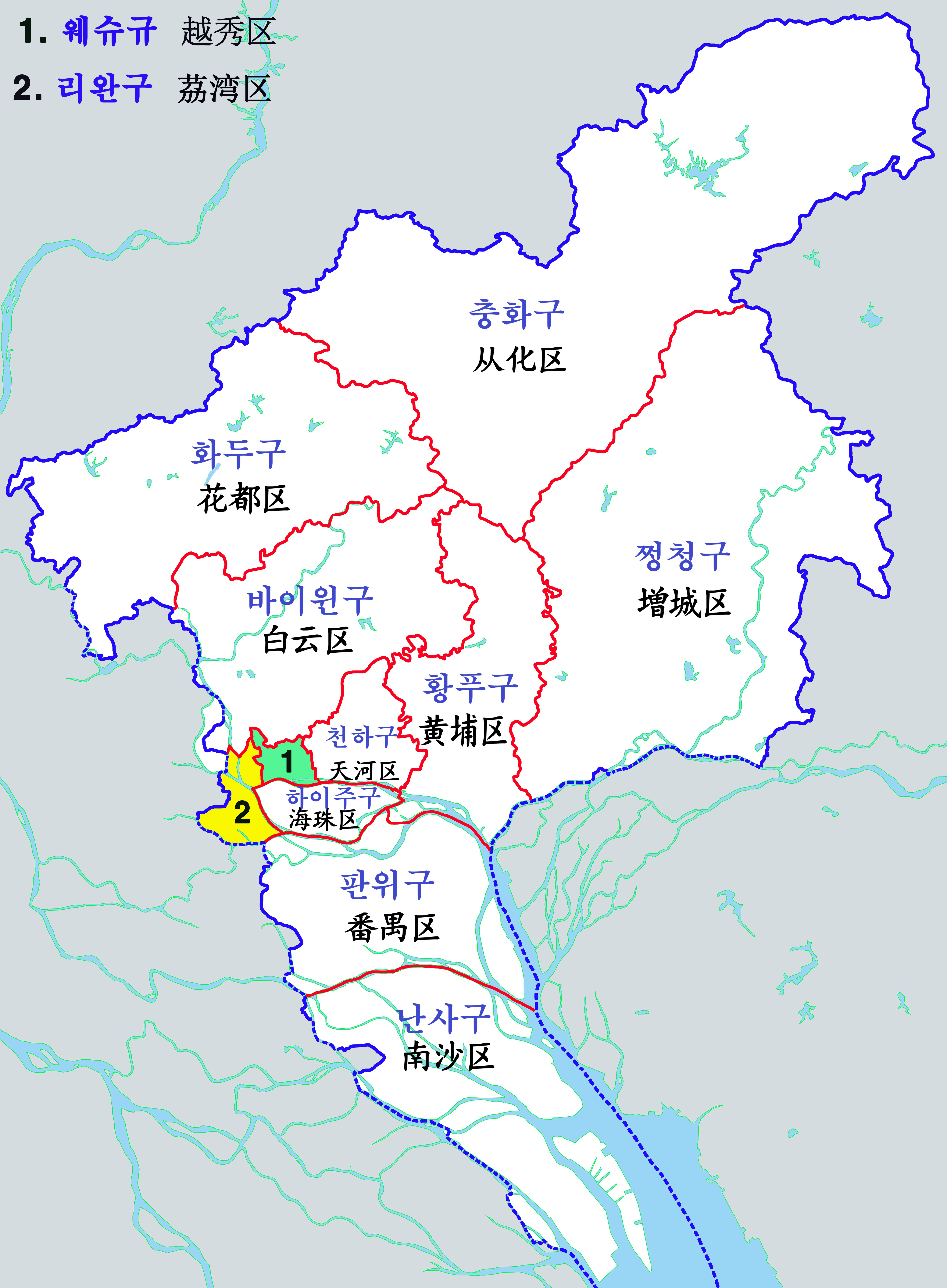 광저우시 현급행정구역